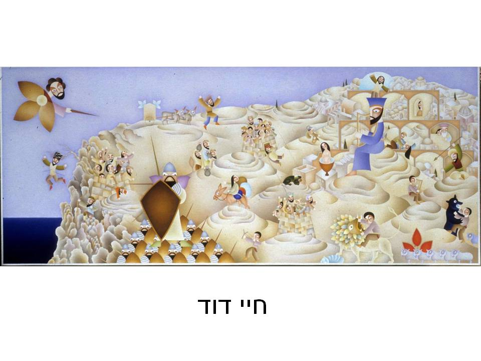 חיי דוד